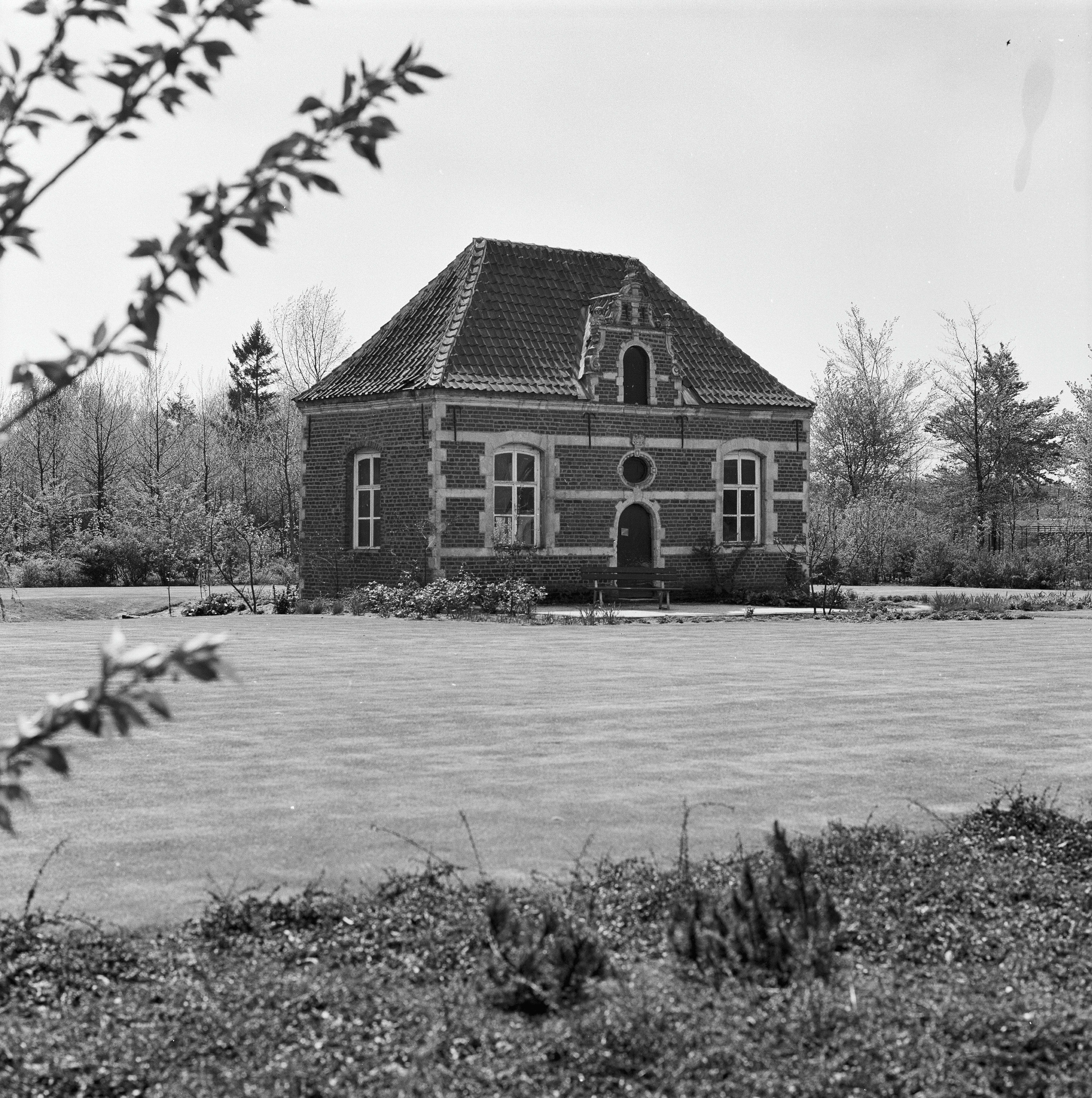 Klooster Sint Elisabethsdal: Voor- en zijgevel zogenaamd Pesthuisje bij klooster Sint Elisabethsdal (opmerking: Oud adres: Roggelseweg 57)